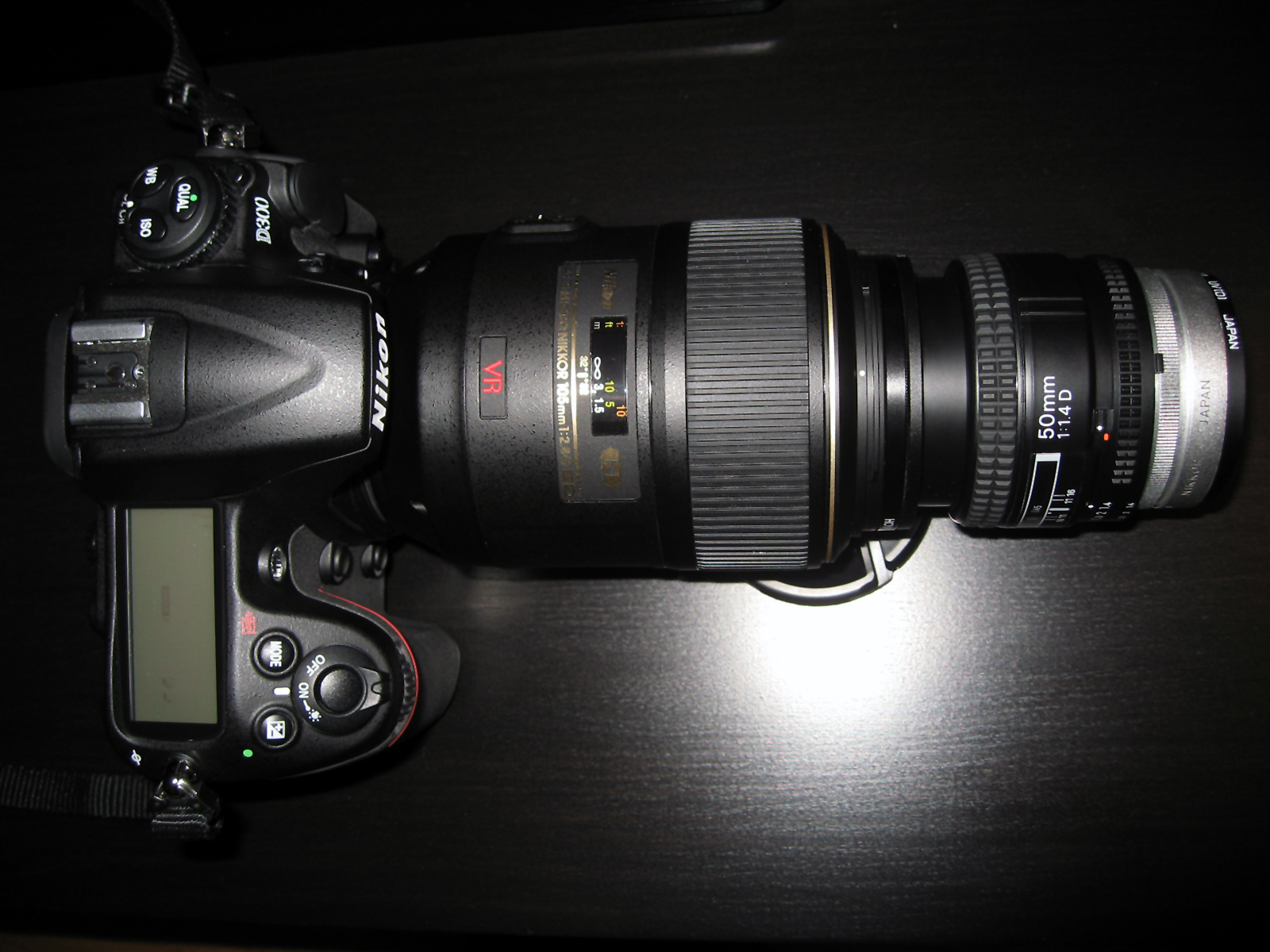 Nikon D300 Lens: Nikon 105mm f/2.8G AF-S VR Reverse lens: Nikon 50mm f/1.4D AF Reverse ring: 62mm to 52mm Filter mount: Nikon F BR-3 + 52mm filter